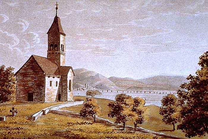 Ulrich von Hutten's grave at the St. Peter & Paul church on Ufenau island